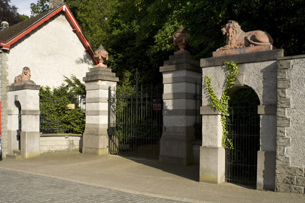 Borstekouterstraat 58, Roborst (Zwalm). Toegang tot het kasteeldomein van Roborst